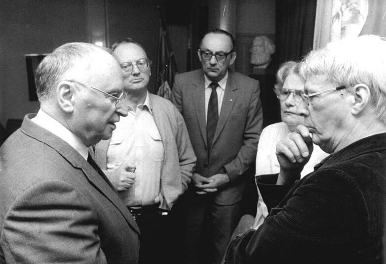 ADN-ZB Link 26.9.85 Berlin: Schriftstellerverband Eine Sitzung des Vorstandes des Schriftstellerverbandes der DDR fand in Berlin statt. Kurt Hager, Mitglied des Politbüros und Sekretär des ZK der SED (l.), und Ursula Ragwitz, Leiter der Abteilung Kultur des ZK der SED (2.v.r.), während einer Pause im Gespräch mit dem Präsidenten des Schriftstellerverbandes, Hermann Kant (2.v.l.), Gerhard Henniger, 1. Sekretär des Schriftstellerverbandes (M.), und Stephan Hermlin (r.).